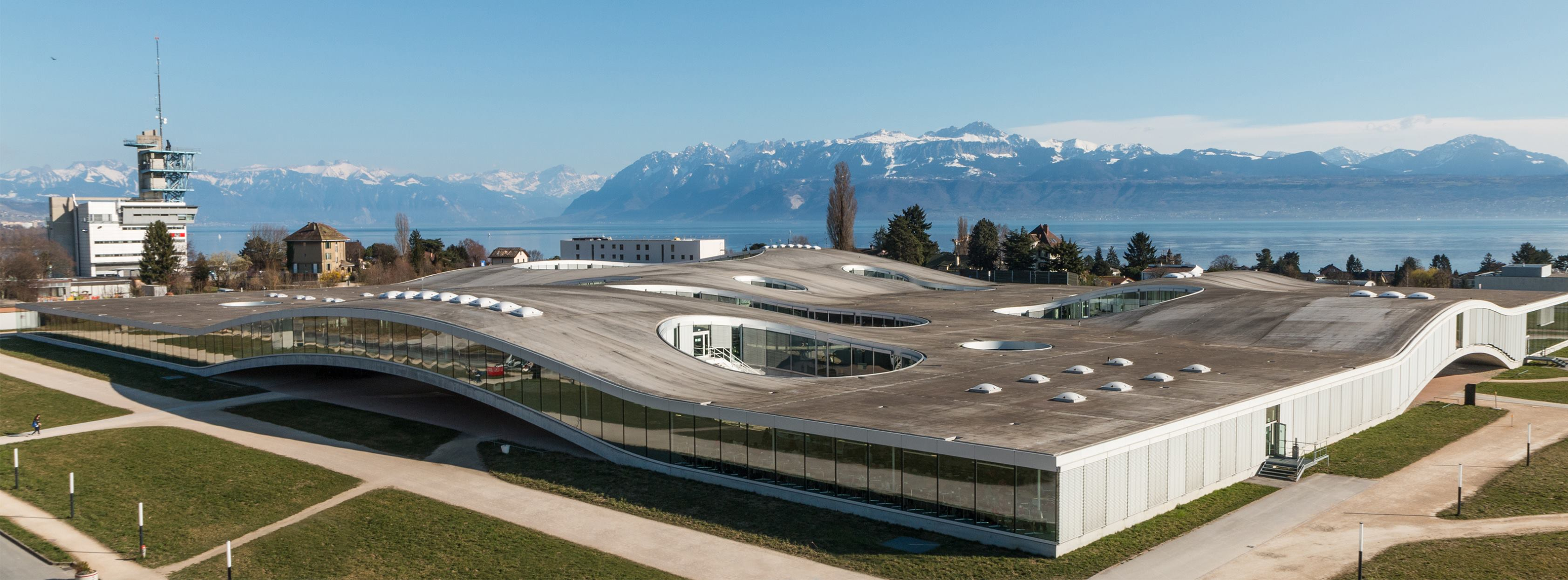 Vue du Learning Center (2017)